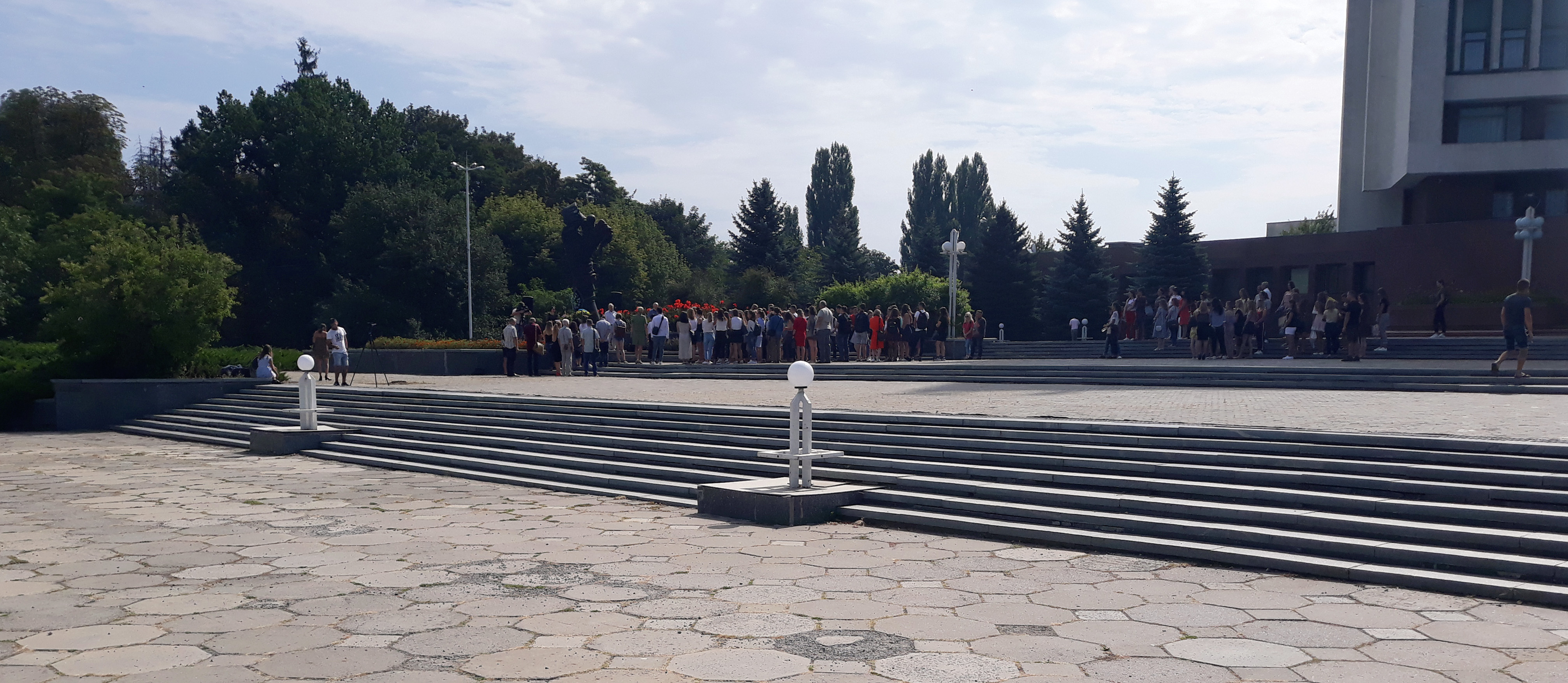 Роковини пам'яті українського поета Василя Стуса у Вінниці 4 вересня 2018 р. Пам'ятник Василю Стусу, площа Василя Стуса, Хмельницьке шосе, Вінниця, Україна.